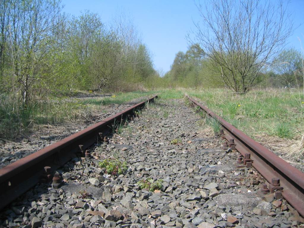 Beschreibung: Eisenbahn in Wipperfürth Fotograf: JensD Aufgenommen: 2005